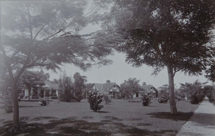 foto. Woonhuizen, mogelijk op het terrein van een zoutwinningsonderneming bij Kalianget , Madoera